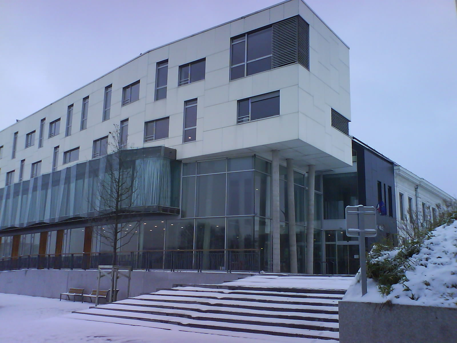 Mairie d'Haubourdin sous la neige, Décembre 2010.